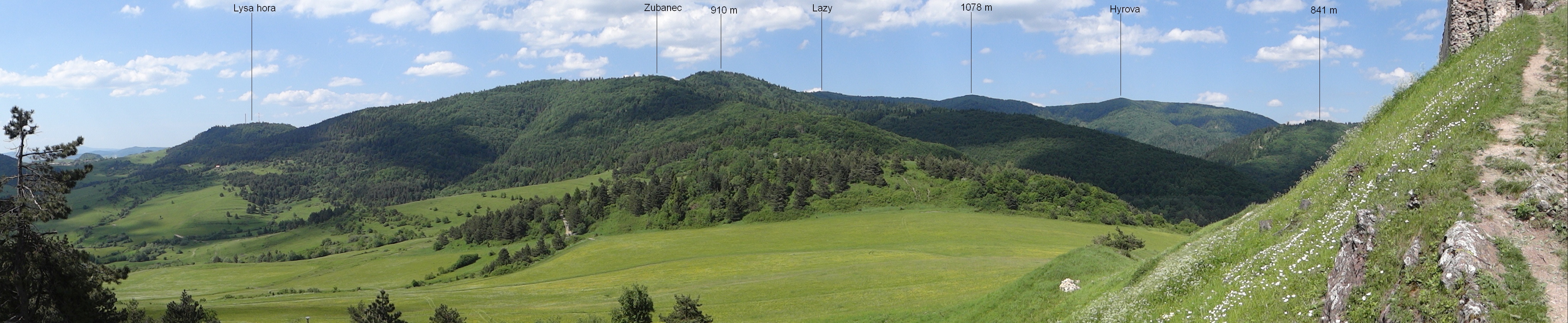 View from Kamenický hrad